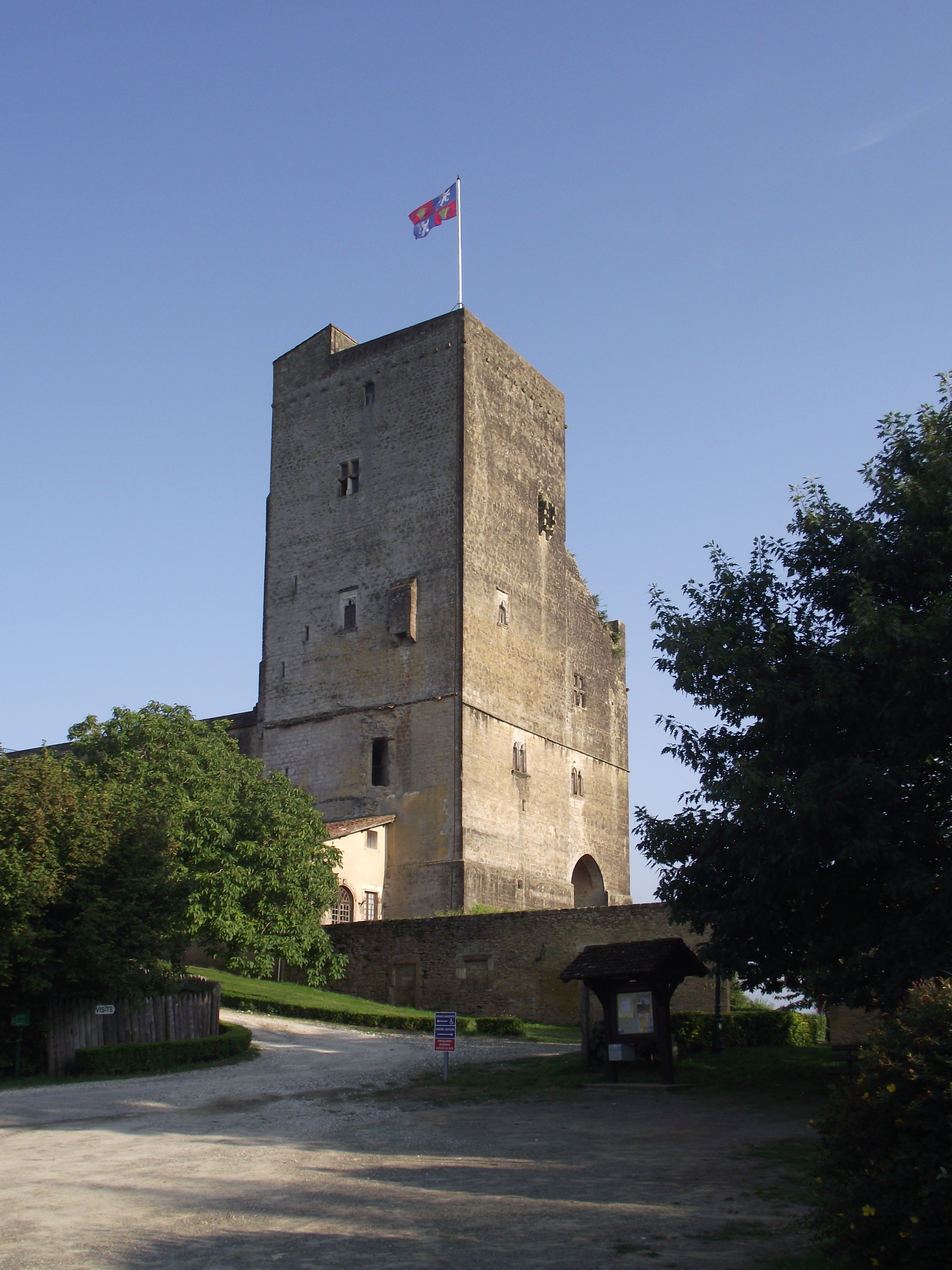 Tour de Termes d'Armagnac (Gers, France)